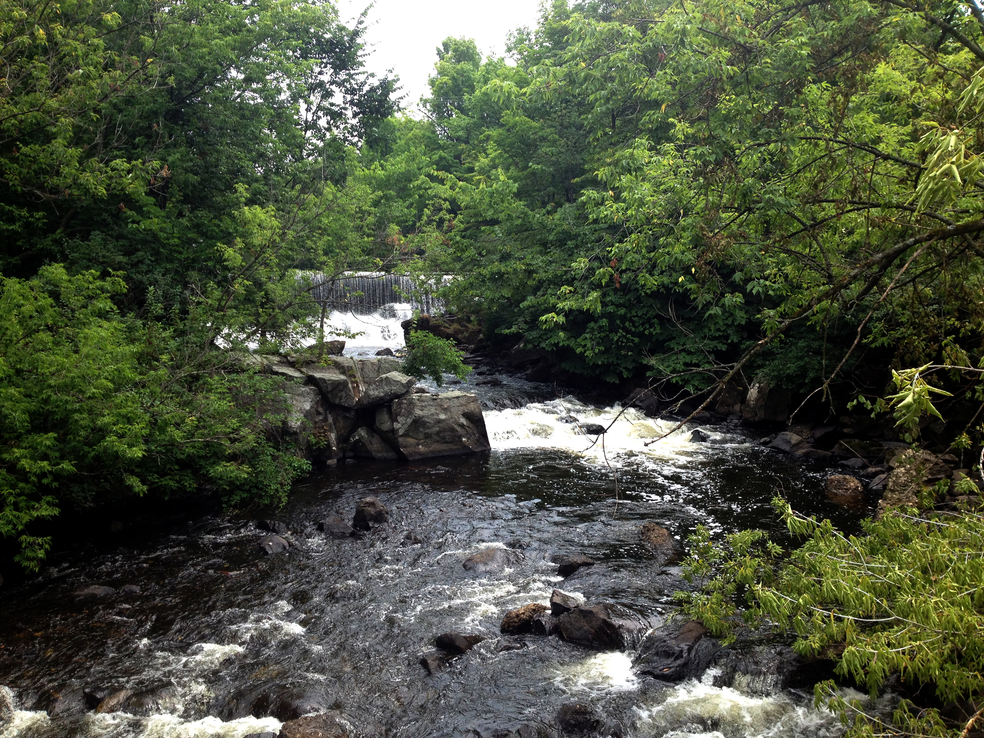 Riviere Yamaska à Granby, 2èmes chutes.